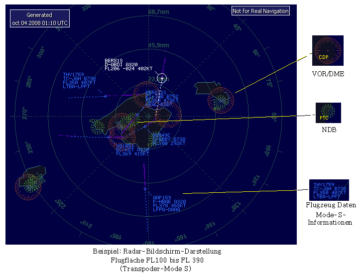 Darstellung Radar Bildschirm Mode S Verfahren Flugflächenausschnitt FL 100 bis FL 390 (andere Höhen sind ausgeblendet)